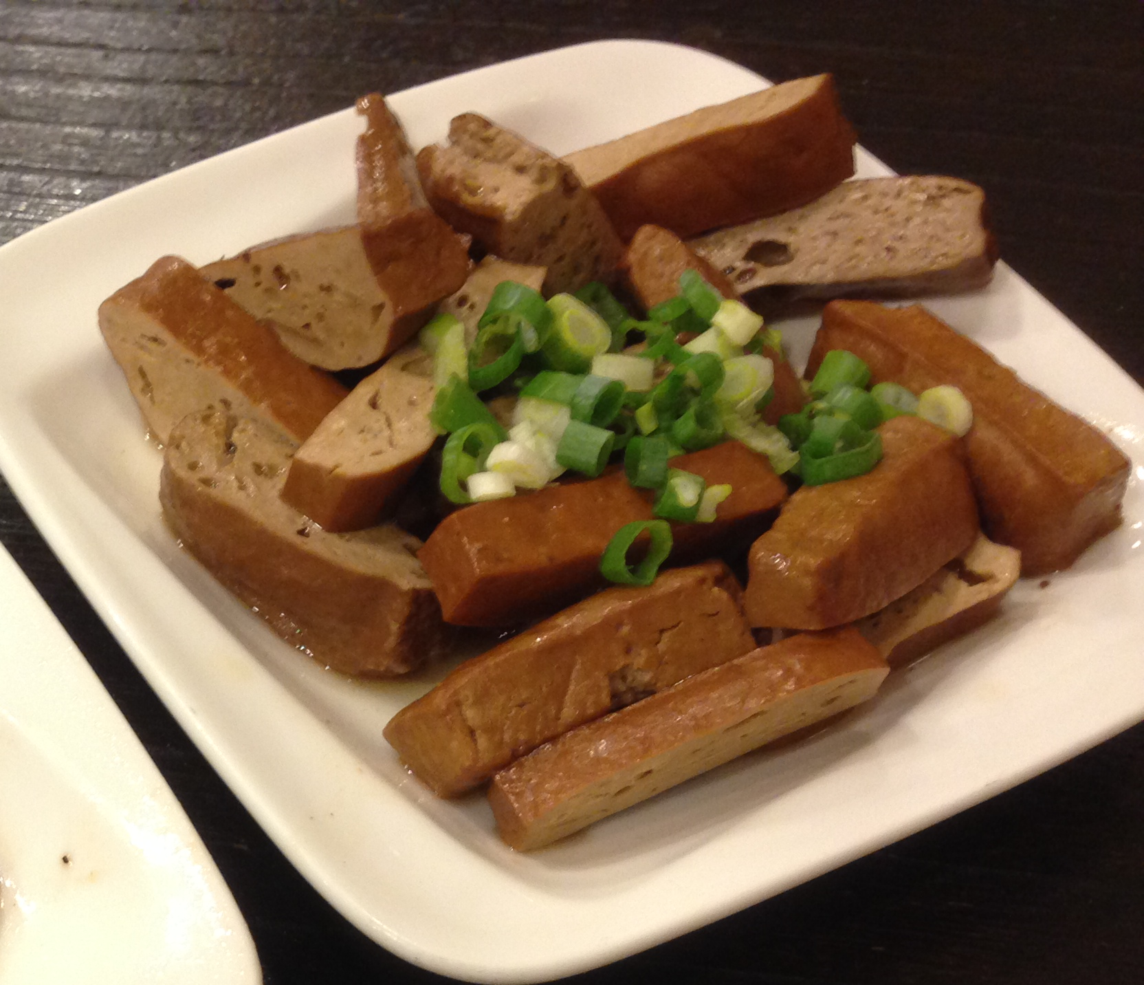 麻辣黃瓜, 熱豆干, 老外一品牛肉麵, 台北